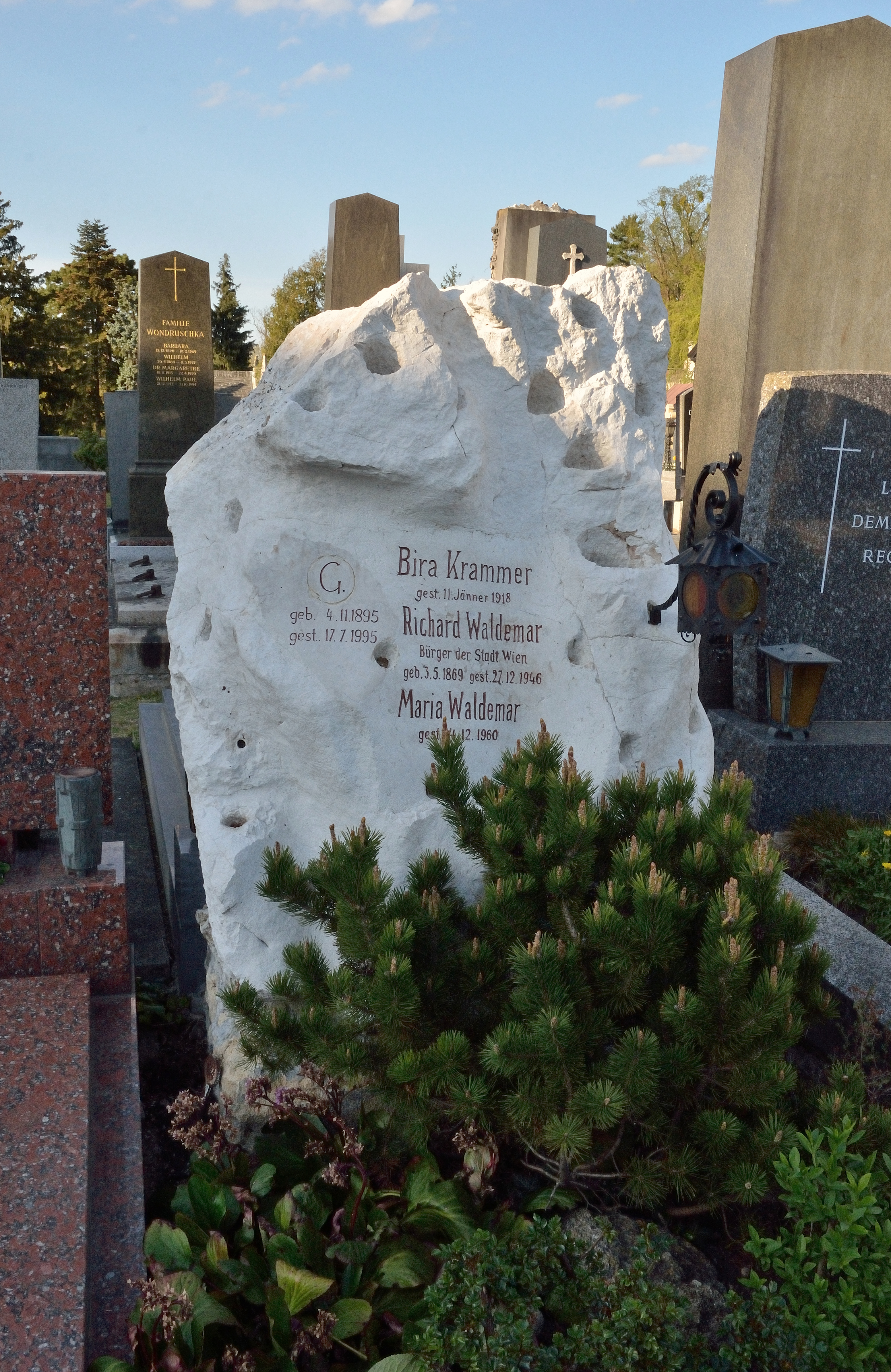 Das Grabmal für Richard Waldemar liegt auf dem Hietzinger Friedhof, Gruppe 12, Nr. 144.